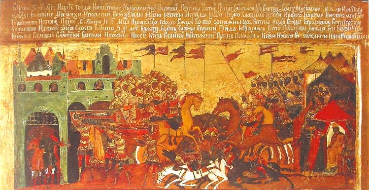 Битва русских и монголо-татарских дружин у Ярославля. Клеймо иконы «Василий и Константин в житии»